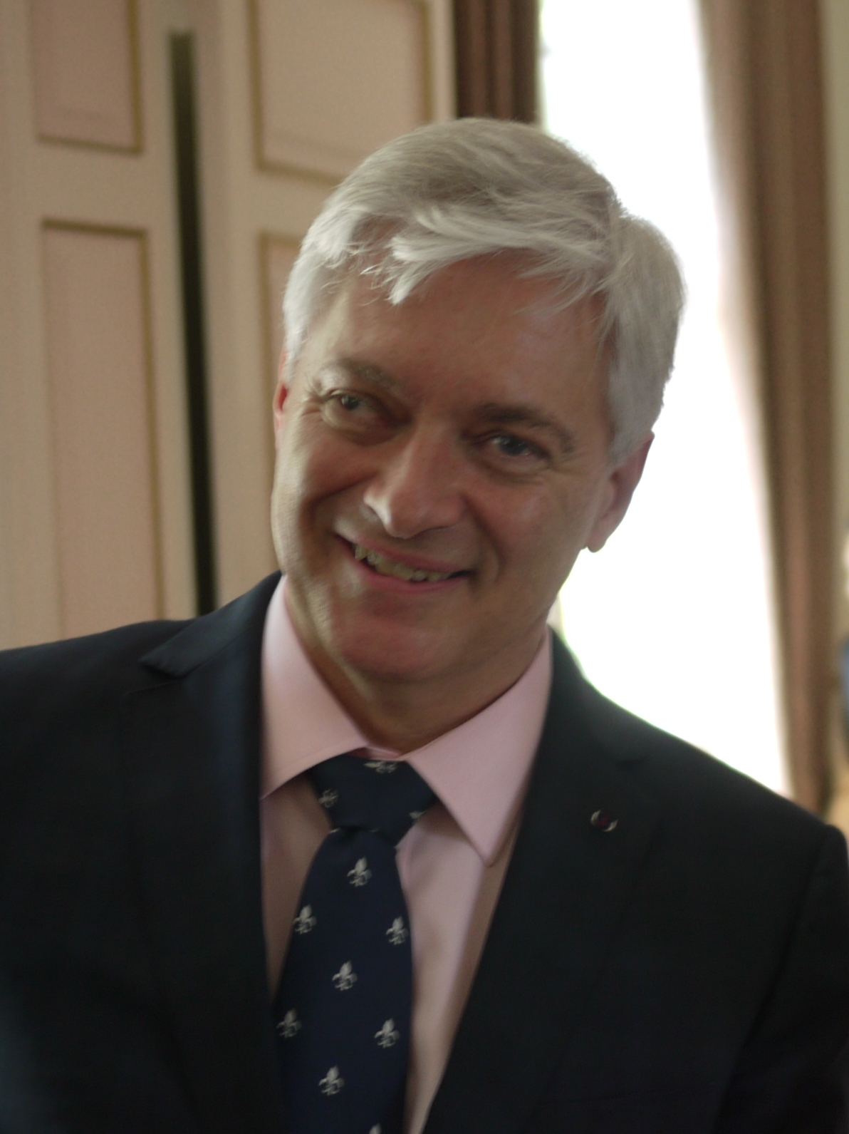 Wegger Christian Strømmen